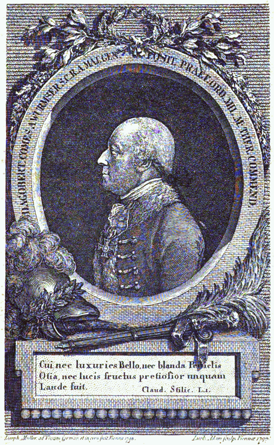 Dagobert Sigmund von Wurmser (1724-1797), österreichischer Feldmarschall